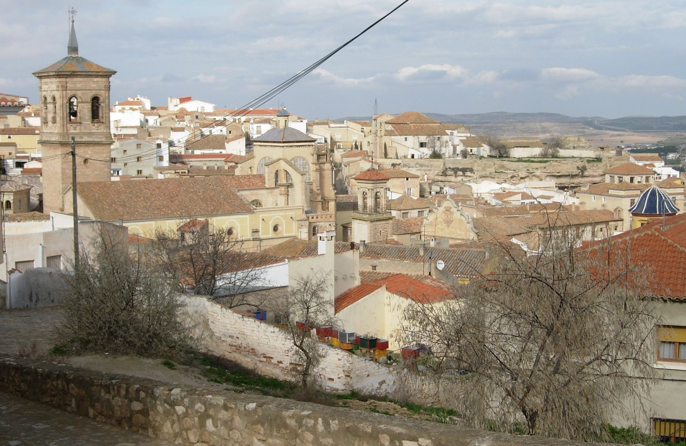 Vista de la ciudad de Chinchilla de Montearagón (Albacete, España).